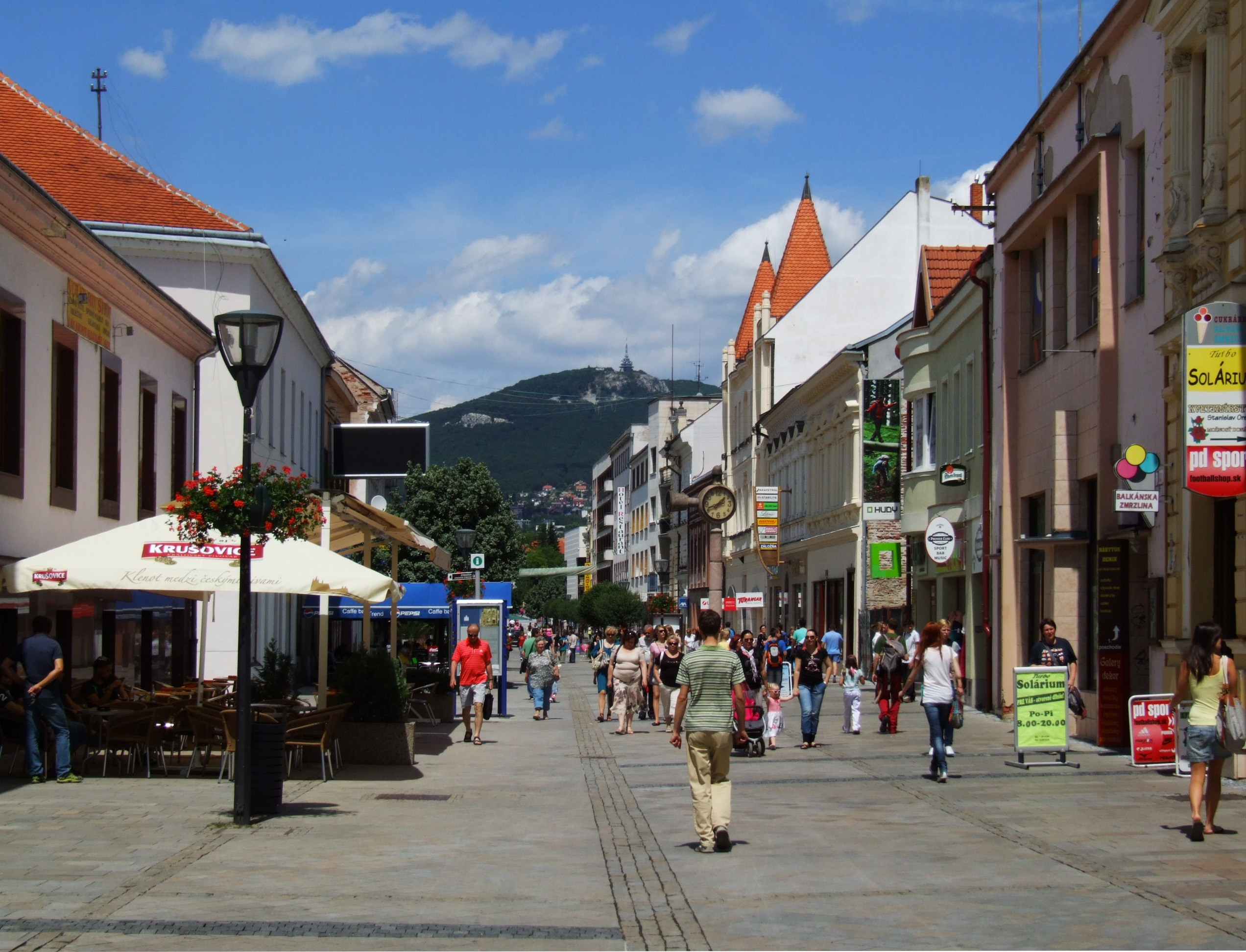 Nitra - Štefánikova trieda